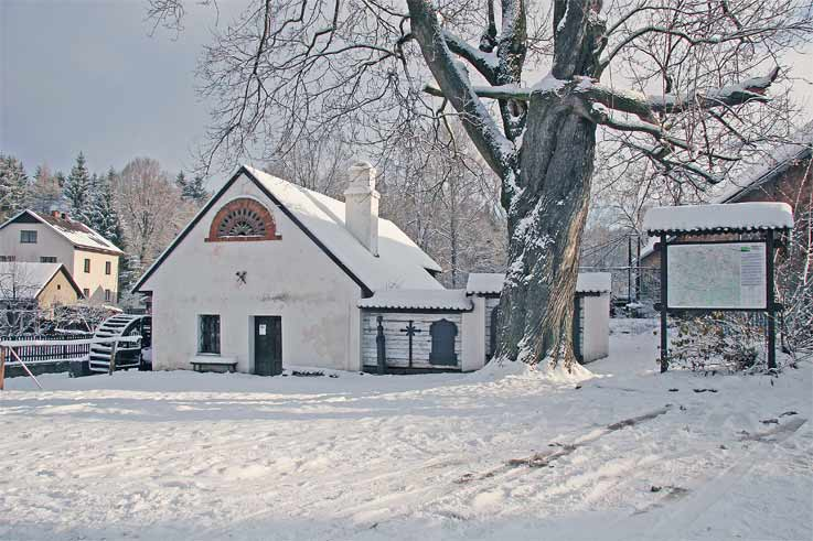 Vodní kovací hamr ve Svobodných Hamrech v zimě (Skanzen lidových staveb Vysočina).